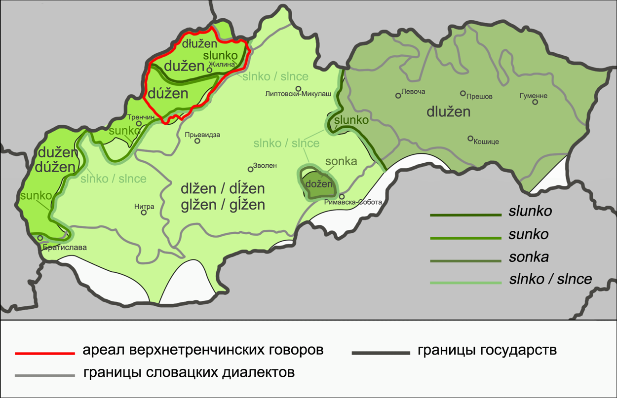 Континуанты сочетания язычного согласного и плавного l̥ в словацких диалектах (c указанием верхнетренчинского ареала) на примере слов dlžen и slnko. Источники: Pauliny E. Fonologický vývin slovenčiny. — Bratislava: Slovenské pedagogické nakladateľstvo, 1963. — 360 S. — s. 158—159